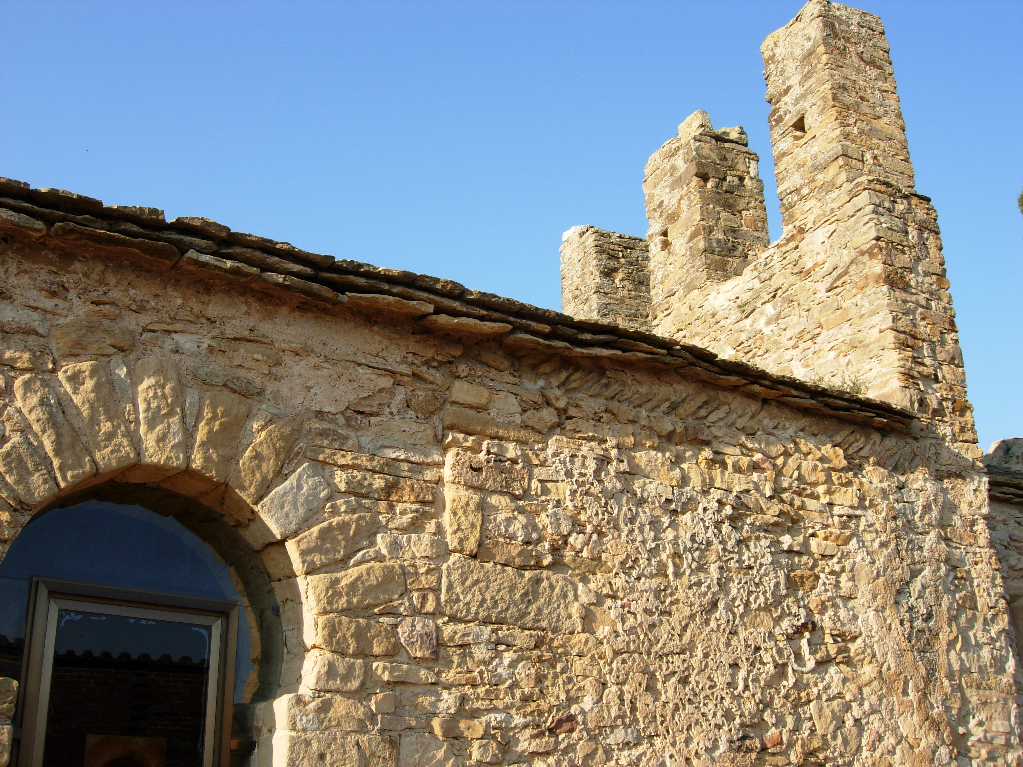 façada de l'església